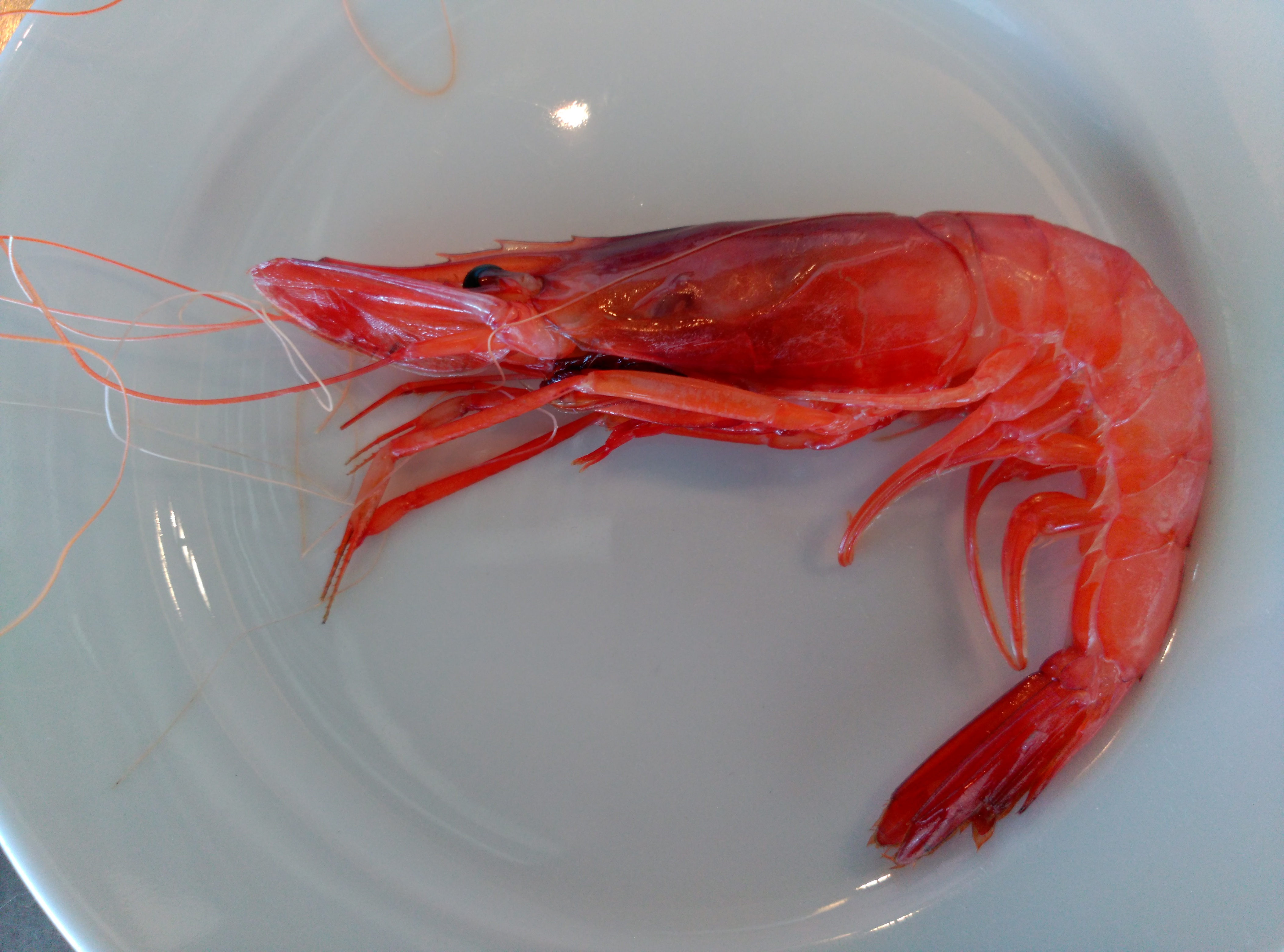 Gamba de Palamós crua a l'Espai del Peix de Palamós